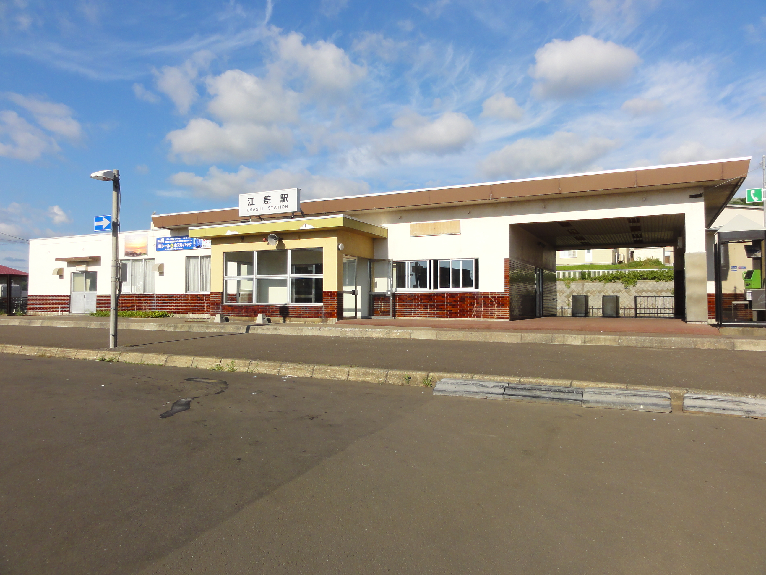 江差駅